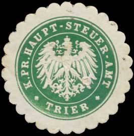 Sealing stamp Title: K.Pr. Haupt-Steuer-Amt Trier Description: grün, weiß, geprägt Place: Trier size: 4 cm